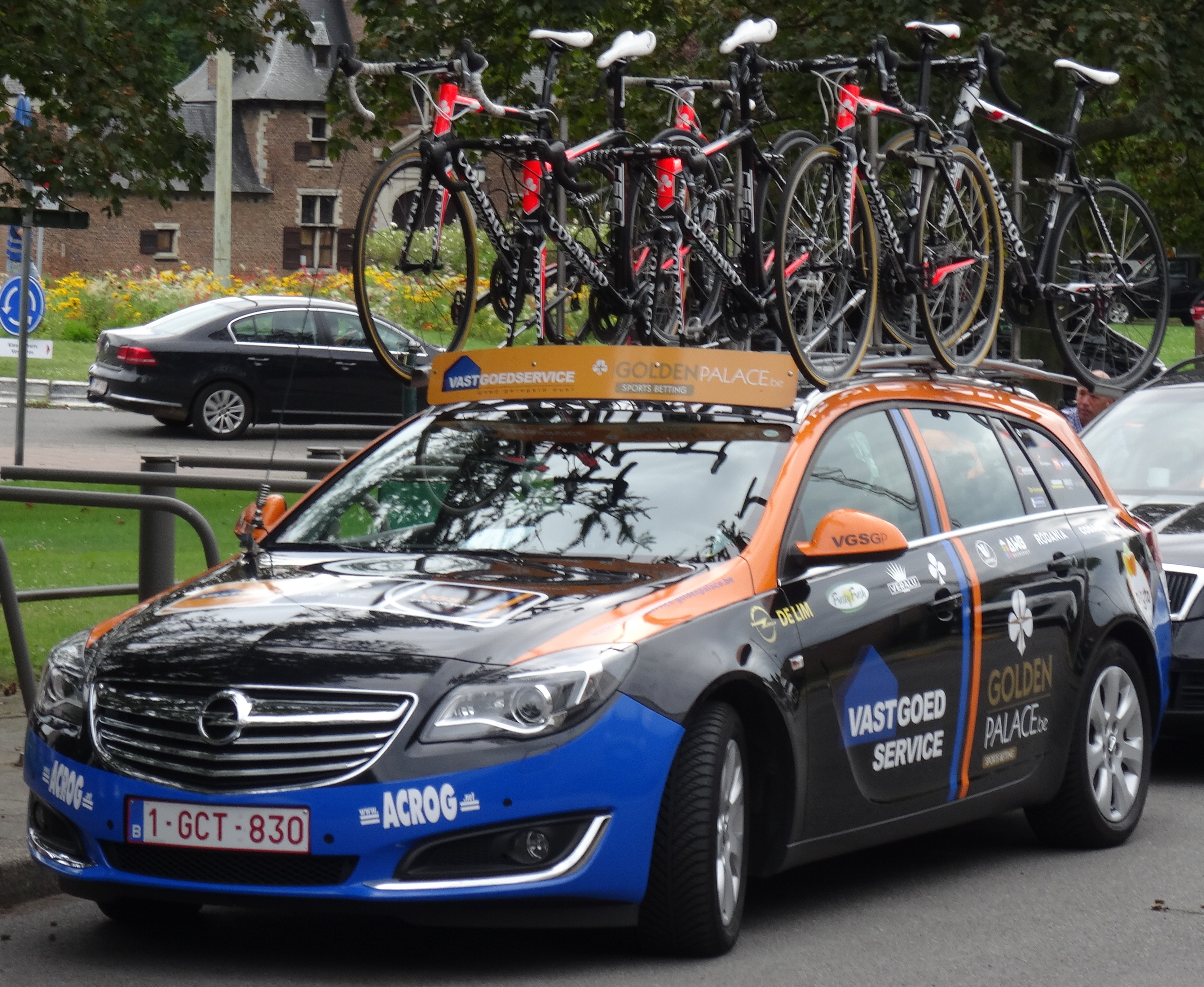 Reportage photographique réalisé le dimanche 10 août à l'occasion du départ et de l'arrivée de la Flèche du port d'Anvers 2014 à Merksem (Anvers), Belgique.